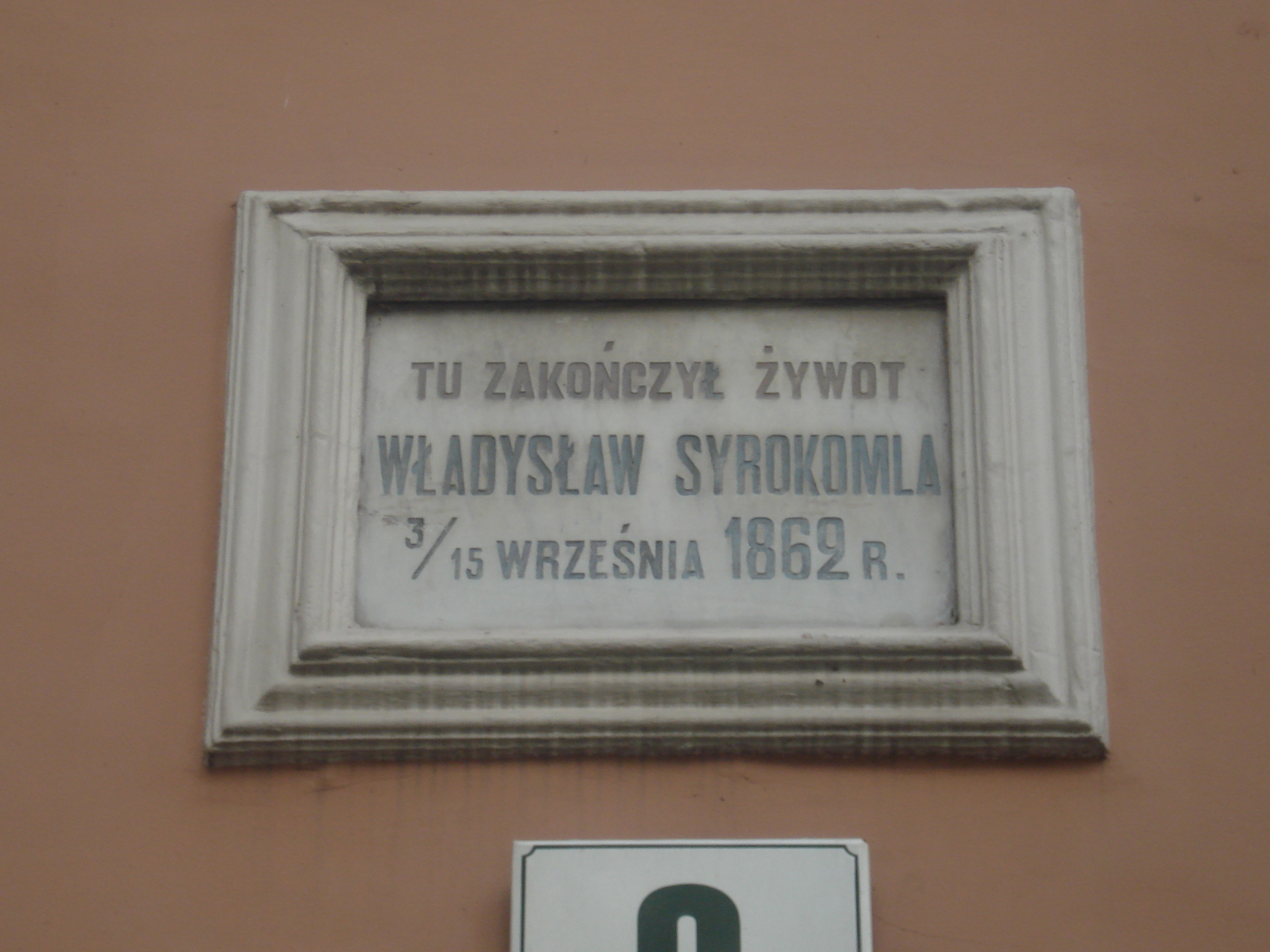 Władysław Syrokomla memorial tablet in Vilnius (Barboros Radvilaites g. 3).